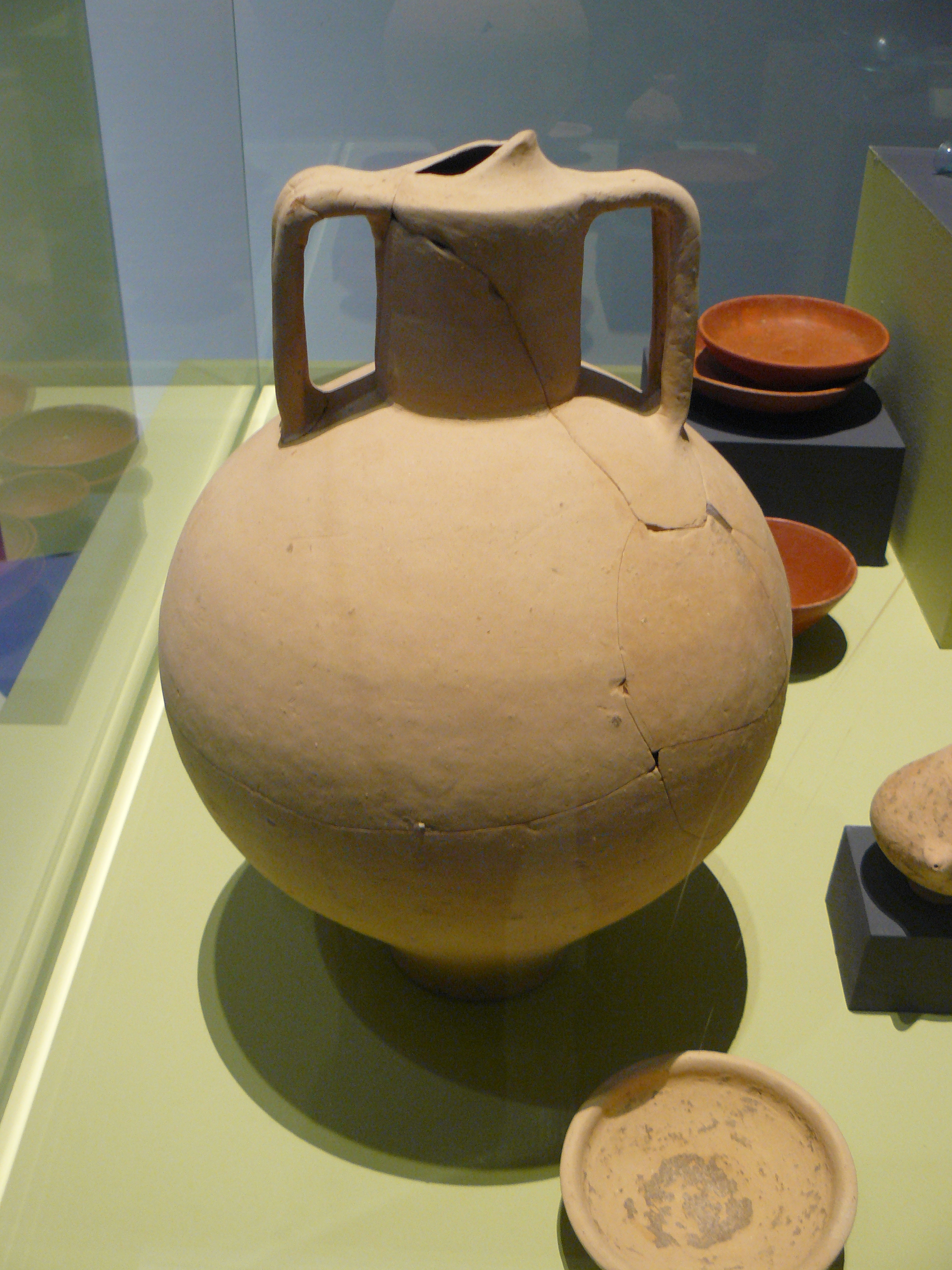 Cruche exposée durant l'exposition Claude, un empereur au destin singulier au MBA Lyon.